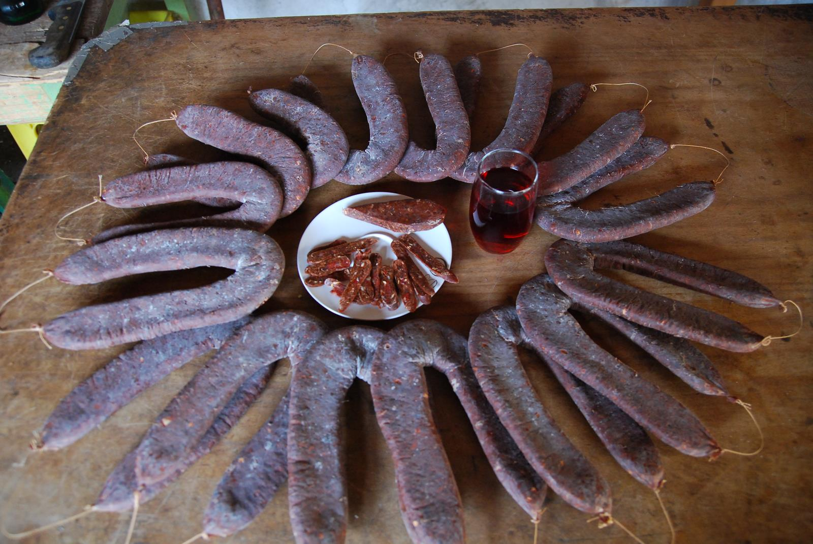 Пеглана кобасица Пирот